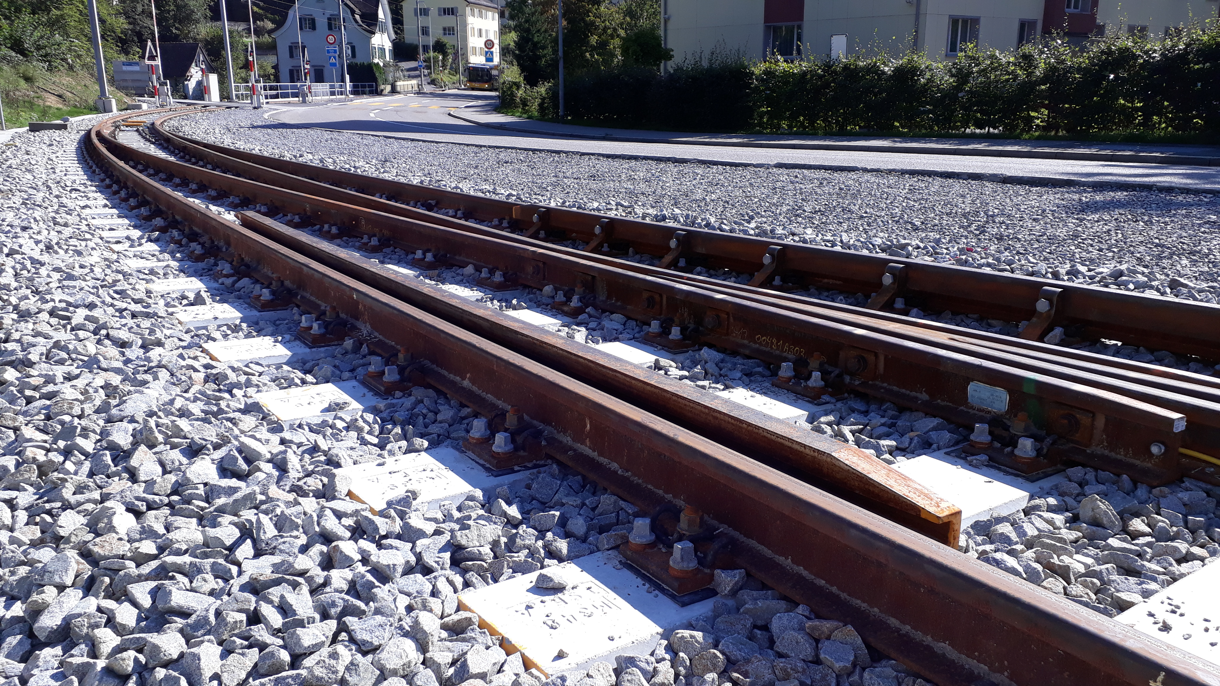 Radlenker in der Dienststation Liebegg der Appenzeller Bahnen (AB) mit einer Radlenkerüberhöhung von 30 Millimeter. Damit die Tango-Züge sowohl die Rillenschienen in der Stadt St. Gallen als auch den Streckenabschnitt St. Gallen–Gais–Appenzell (SGA) befahren können, werden Radreifenprofile wie beim Karlsruher Modell verwendet. Die Radlenker auf der SGA-Strecken wurden bei allen Weichen erhöht.